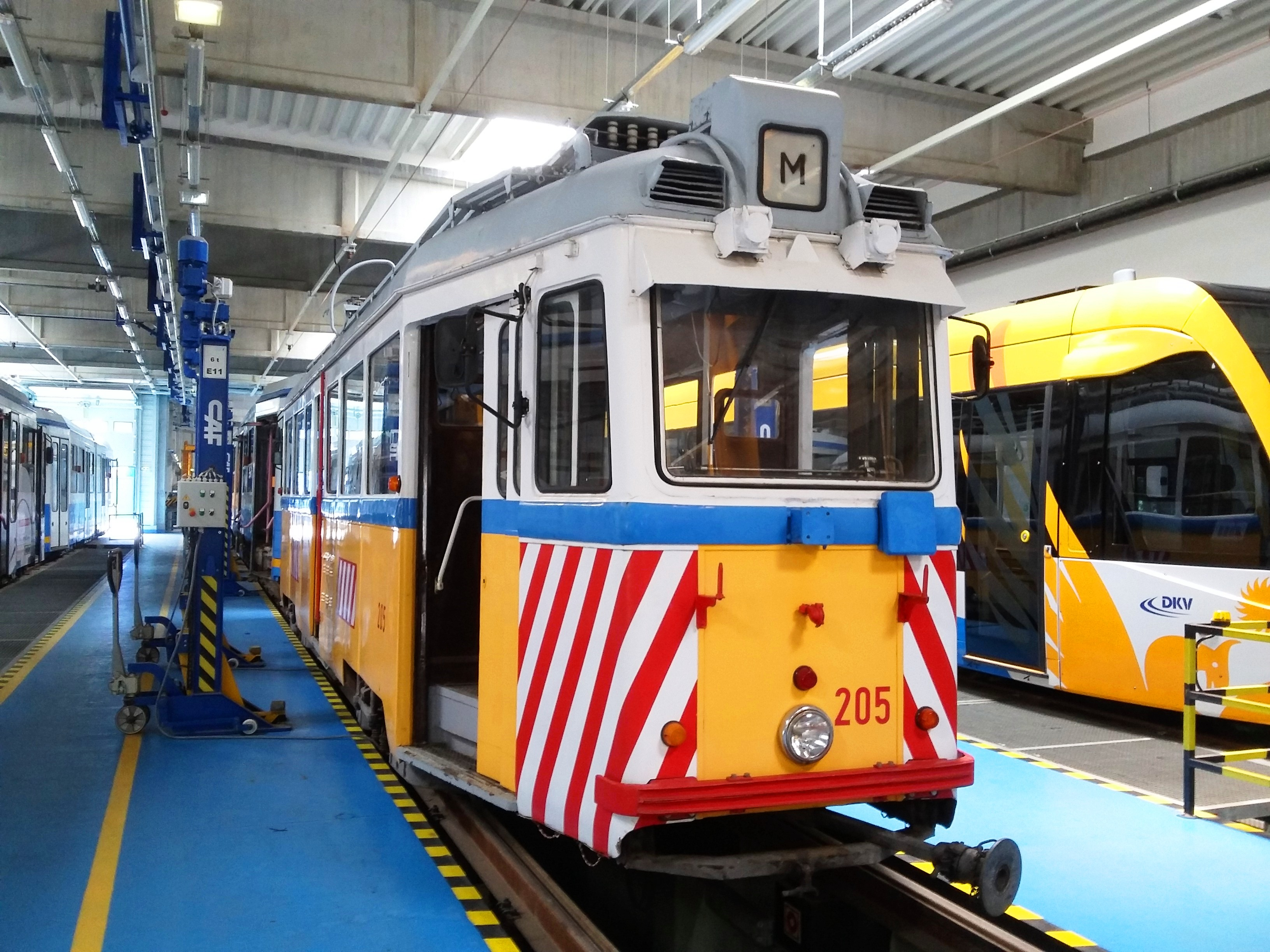 Az utolsó megmaradt 2 vezetőállásos UV villamos a DKV telephelyén üzemi kocsiként. A villamos eredetileg Budapesten közlekedett.